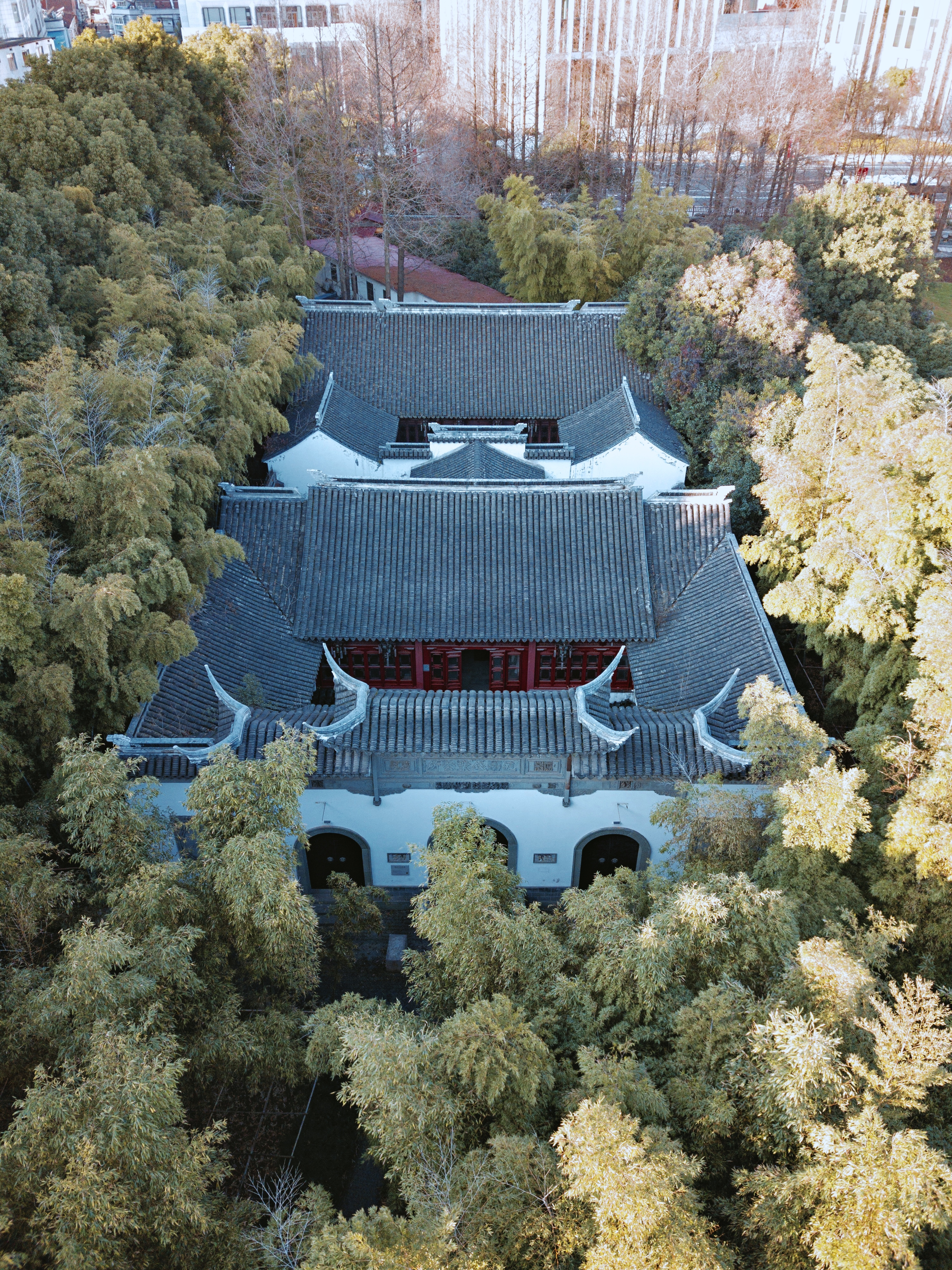 南市钱业公所·沪南钱业公所·上海